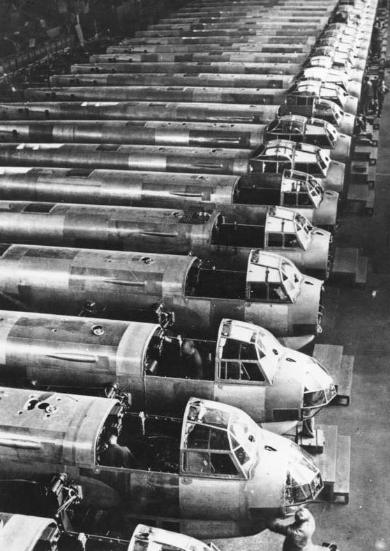 Stukas noch und noch. Teile einer im Bau befindlichen Serie der Ju 88. In riesigen Fabrikhallen entstehen diese Maschinen, die sich im Kampf gegen Russland aufs Neue bewähren. Fr.OKW. 41.6.25. Sammlung Seiler, Berlin